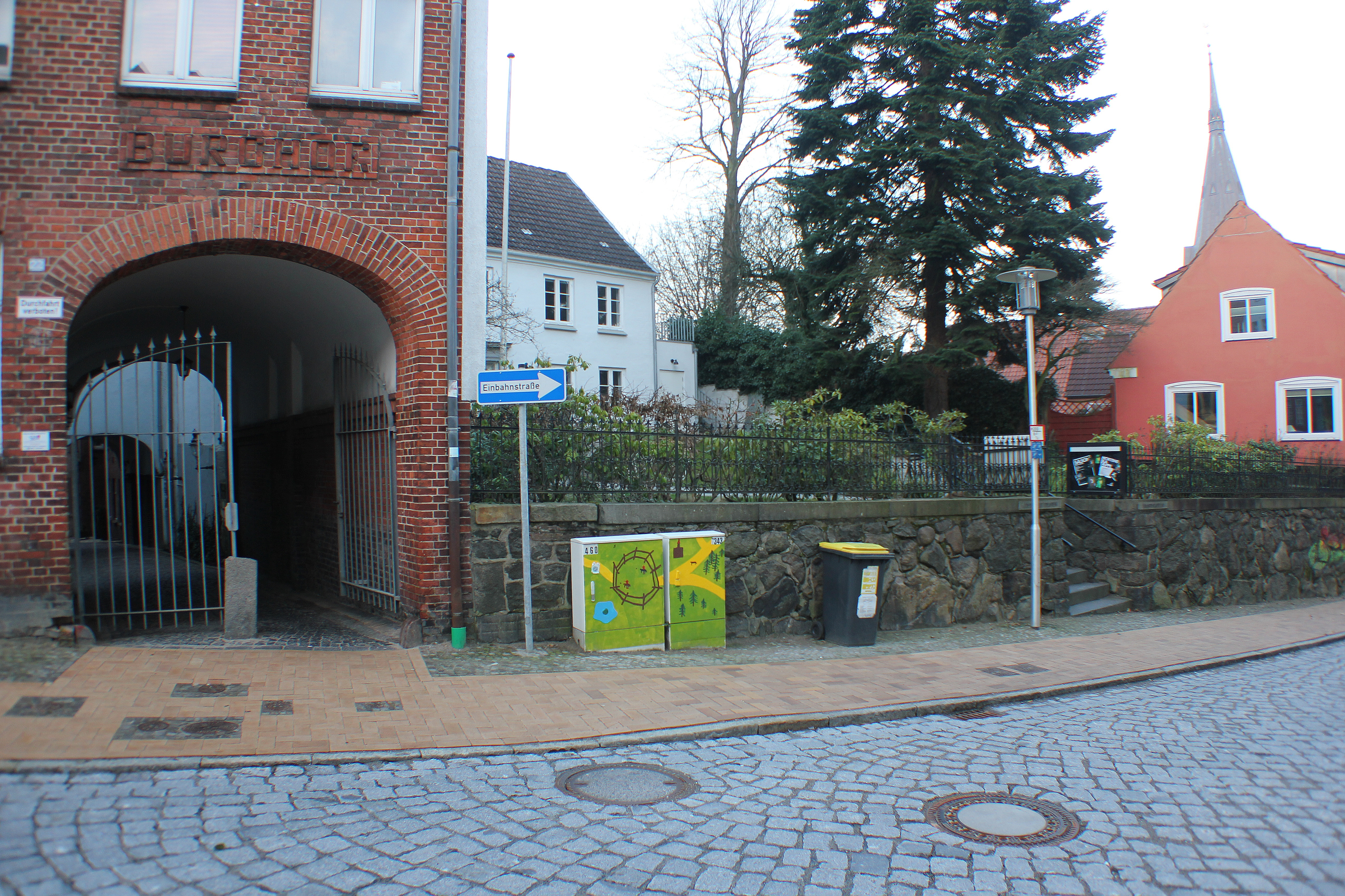 Turmburg im Norderkuhgang (also sozusagen Norderkuh-Burg), dort wo sich Det lille Teater befindet, gleich neben dem Burghof